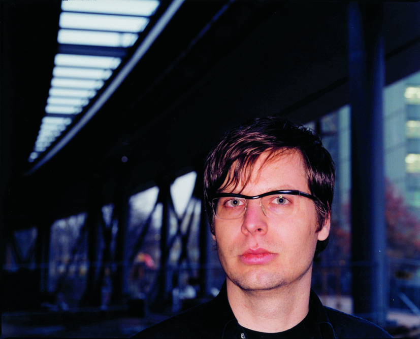 Jan Jelinek